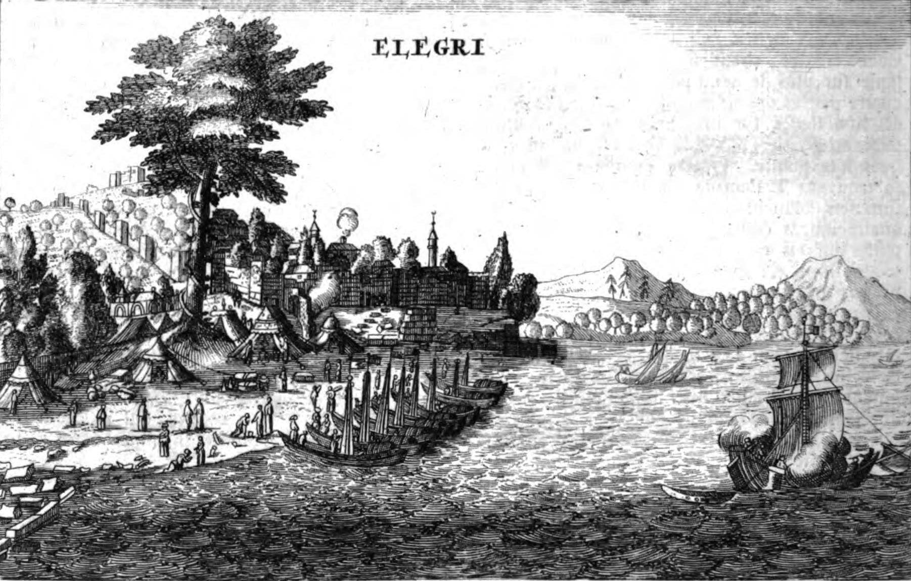 Relation d'un voyage du Levant: fait par ordre du Roi : contenant l'histoire ancienne & moderne de plusieurs isles de l'Archipel, de Constantinople, des Côtes de la Mer Noire, de l'Armenie, de la Georgie, des frontières de Perse & de l'Asie Mineure.